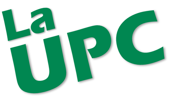 Fonotipo de la Universidad Popular del Cesar. Se convirtió en marca alternativa.